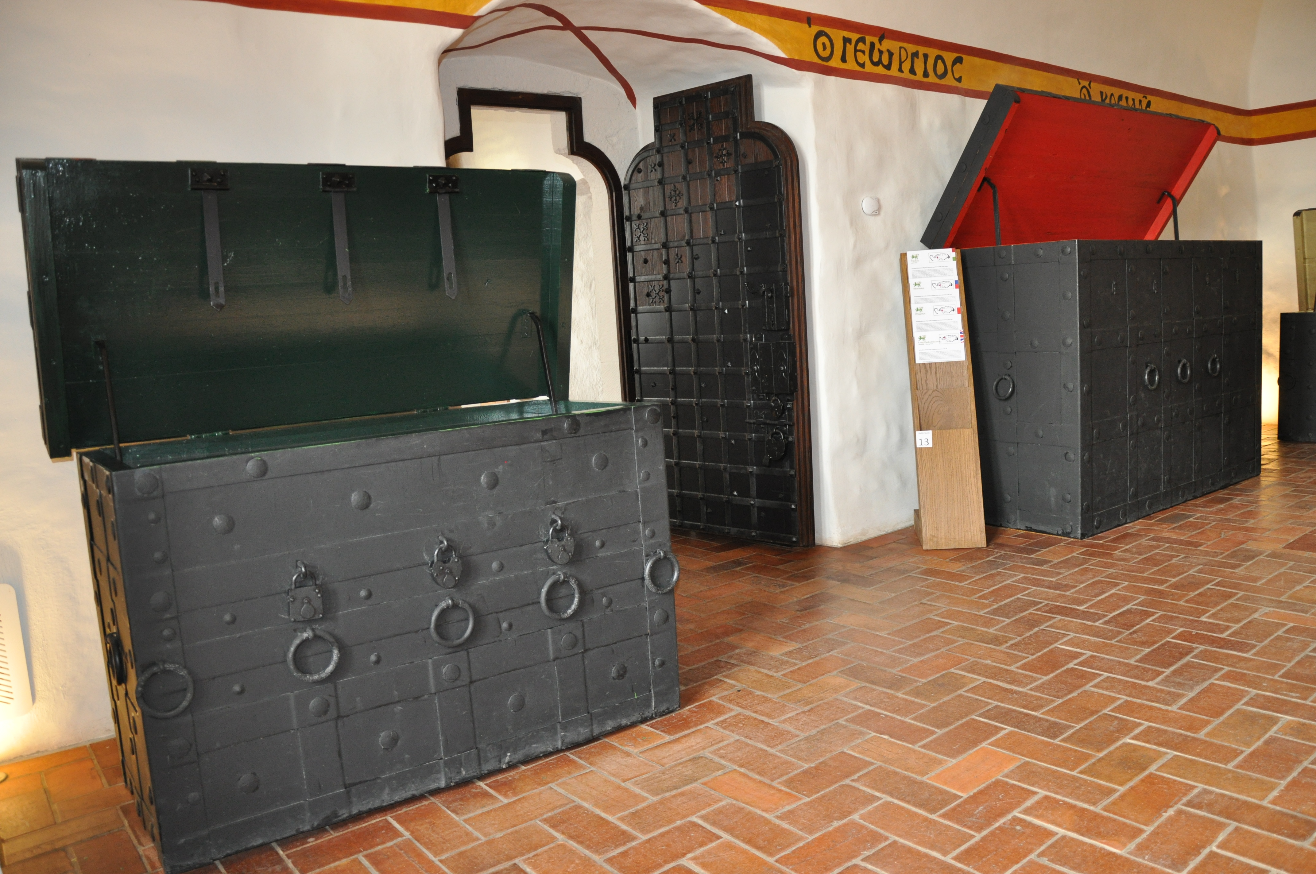 Az újjáépült Füzér vára, tárház - 1526-ban a Magyar Szent Koronát itt őrizték